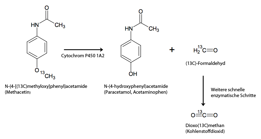 Deitsch: Methacetin wird durch das leberspezifische Cytochrom P450 1A2 zu Paracetamol und 13C-Formaldehyd verstoffwechselt, welches anschließend in mehreren Schritten zu 13CO2 umgesetzt wird.